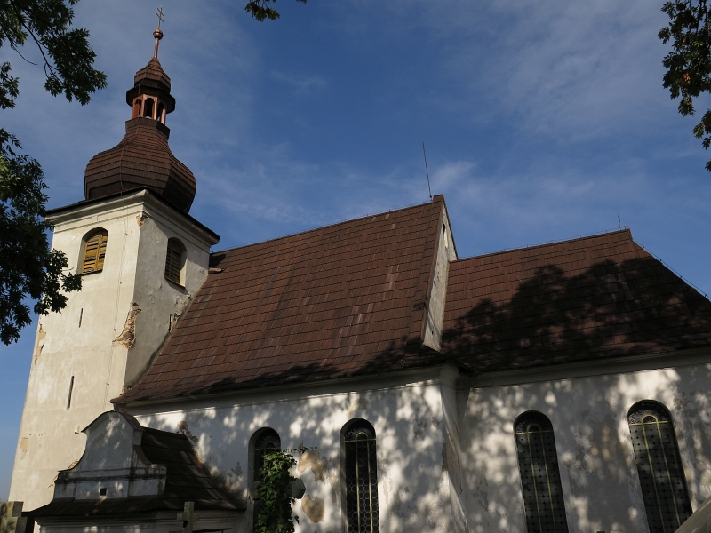 Kostel svatého Jakuba Většího, Čtrnáctka, Mirošov.